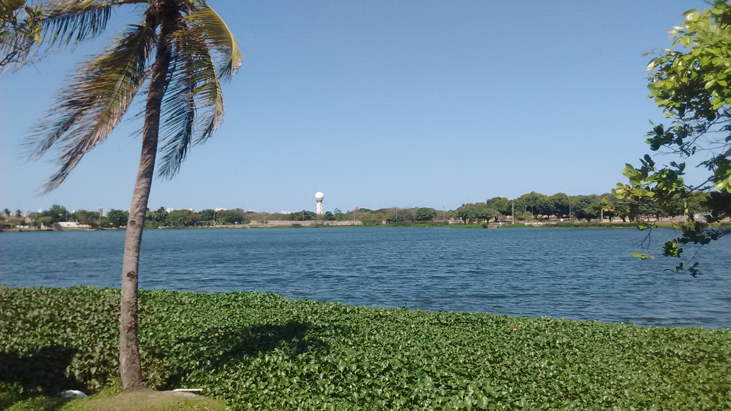 Lagoa do Opaia, Fortaleza, Ceará, Brasil.